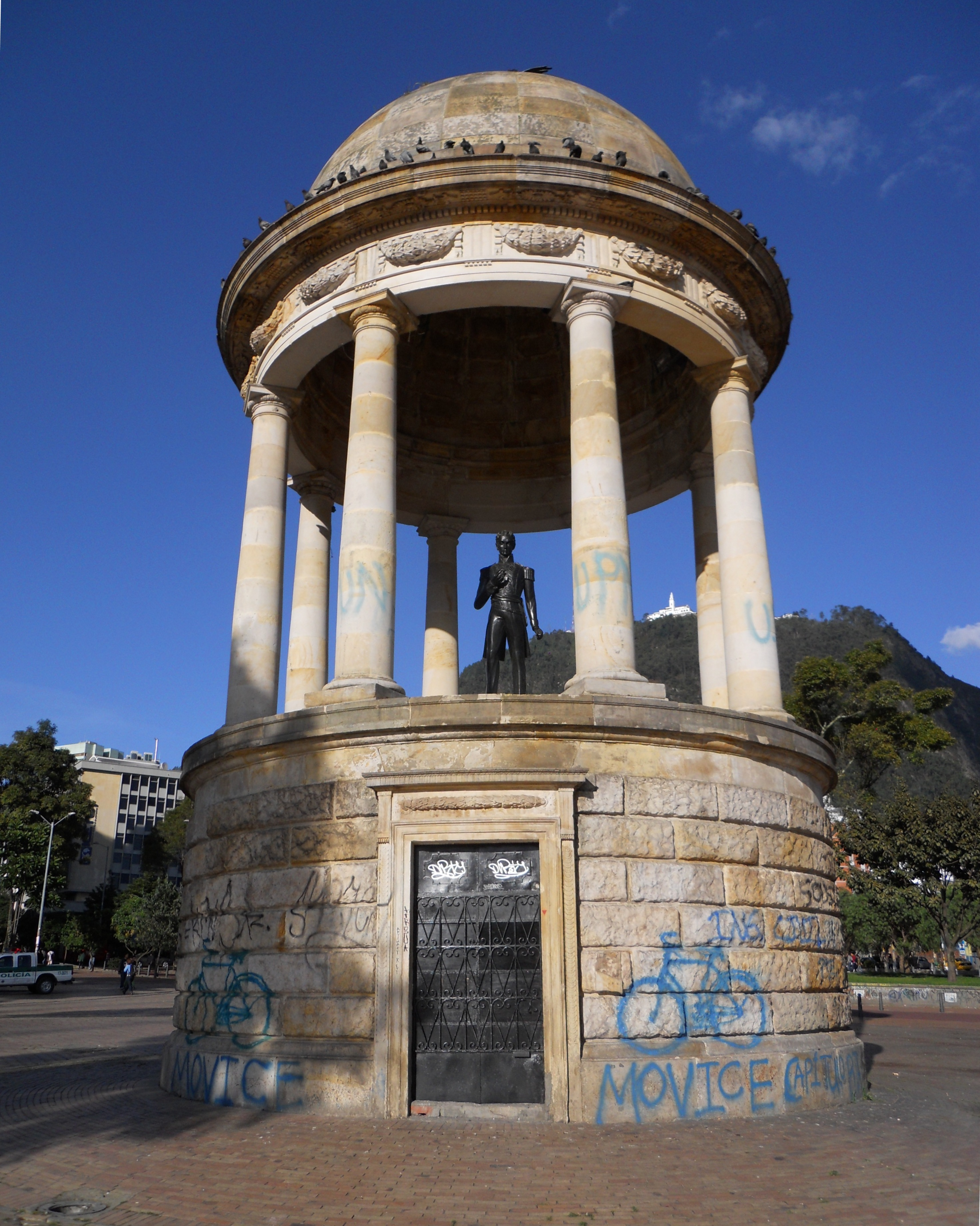 Templete del Libertador Simón Bolívar en el parque de los Periodistas.